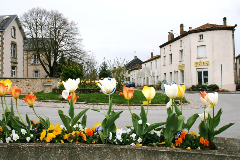 Français